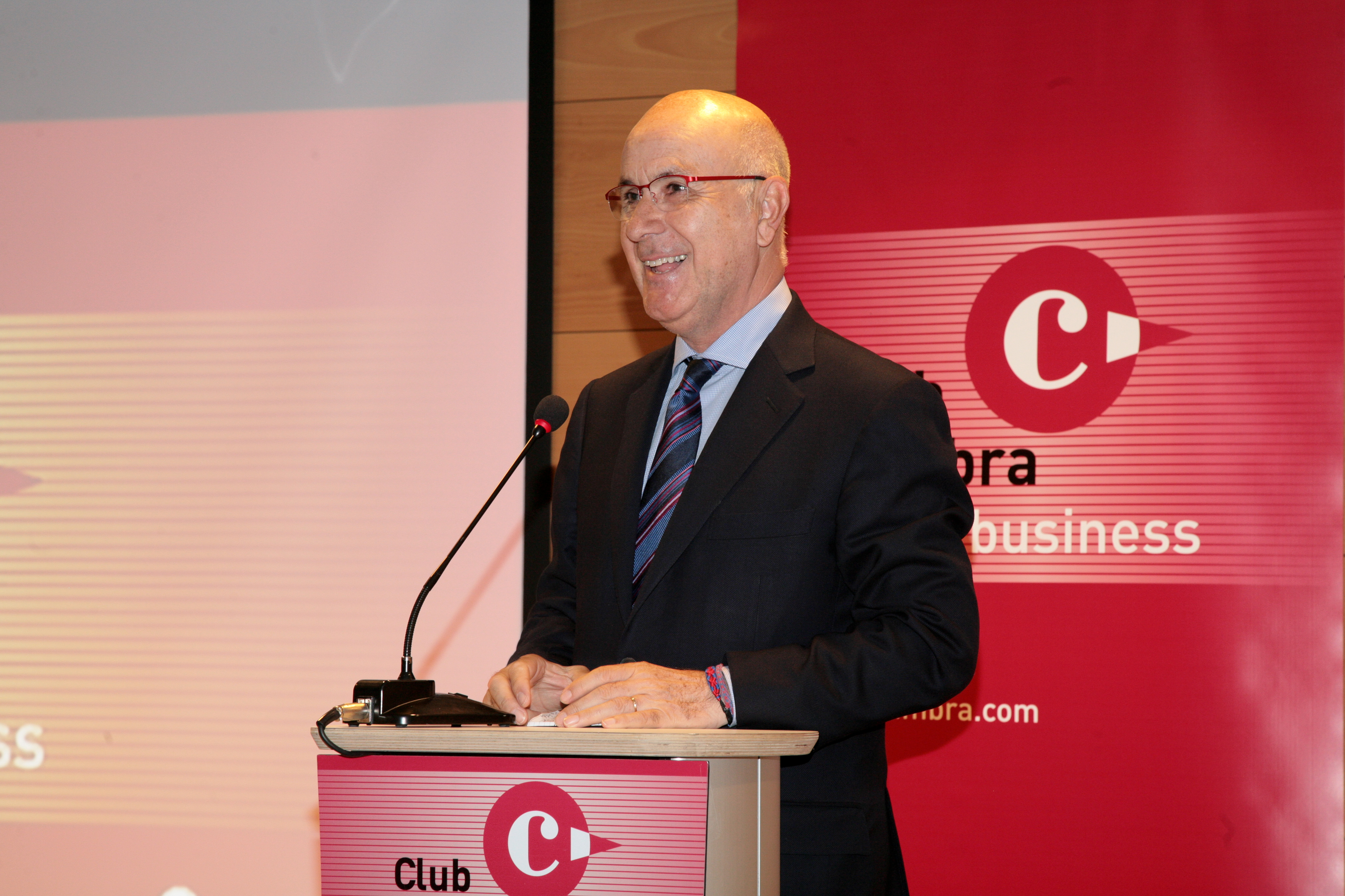 Josep Antoni Duran i Lleida en la presentació del Club Cambra a Berga. Més informació: bit.ly/MFB0t7